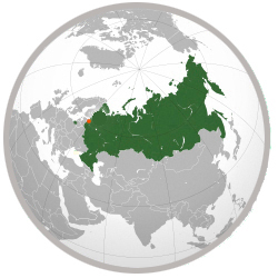 Leningrádi terület elhelyezkedése Oroszországban